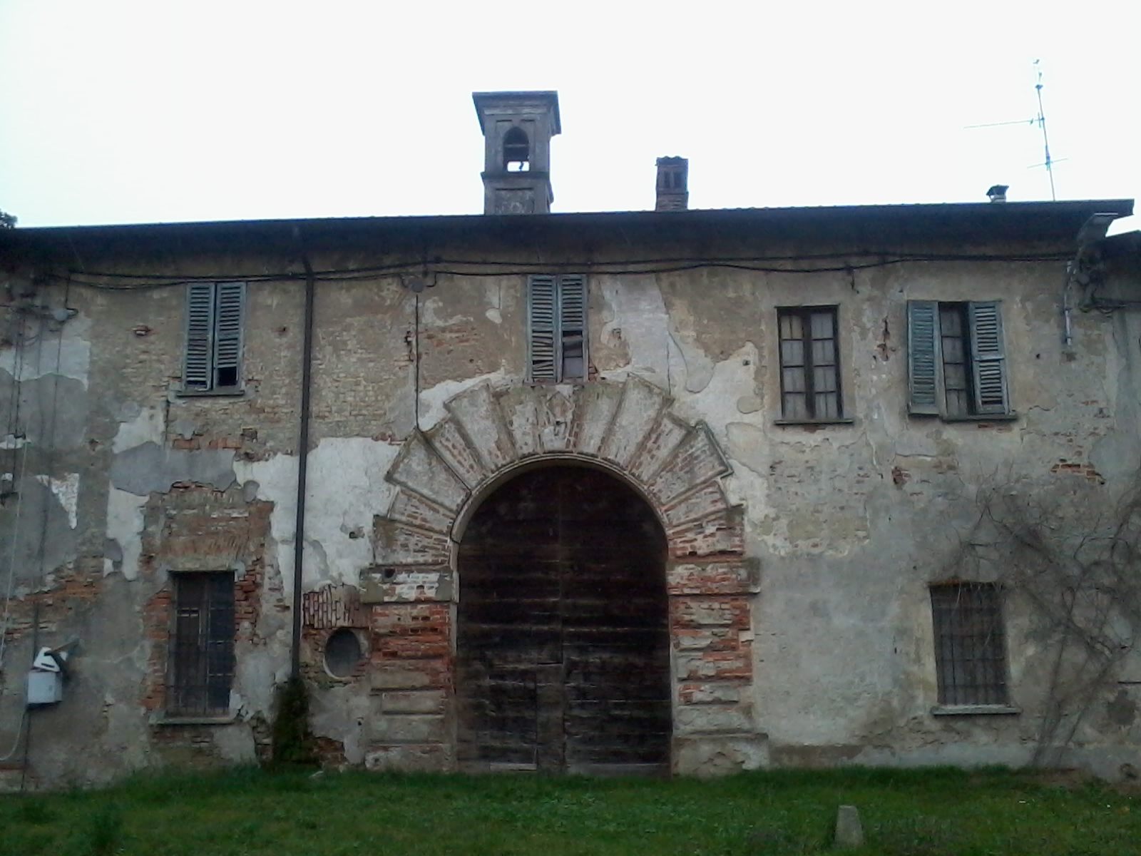 Portale dell'ala padronale della Cascina Scanna - Cisliano (MI) - Italy